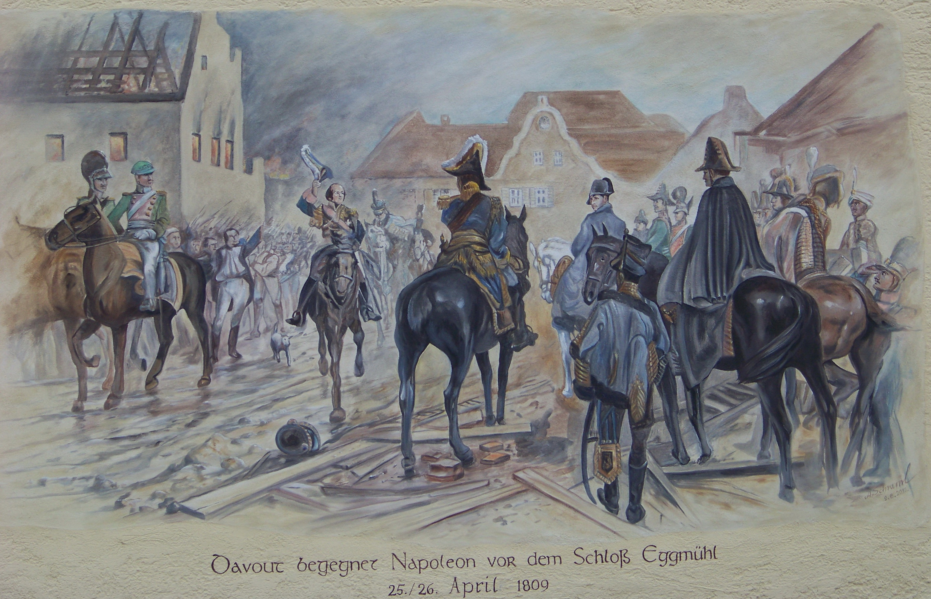 Schierling, Eggmühl, Regensburger Straße 6. Gasthaus Zum Napoleon. Zweigeschossiger und traufständiger Steildachbau in Ecklage, (modern bez.) 1595. Gemälde am Nordgiebel mit der Bildunterschrift: "Davout begegnet Napoleon vor dem Schloss. 25./26. April 1809" Louis-Nicolas Davout (1770–1823), französischer General, Pair, Marschall des Kaiserreichs und Marschall von Frankreich. Das Bild ist signiert mit A. Schraml. 2.8.2012.